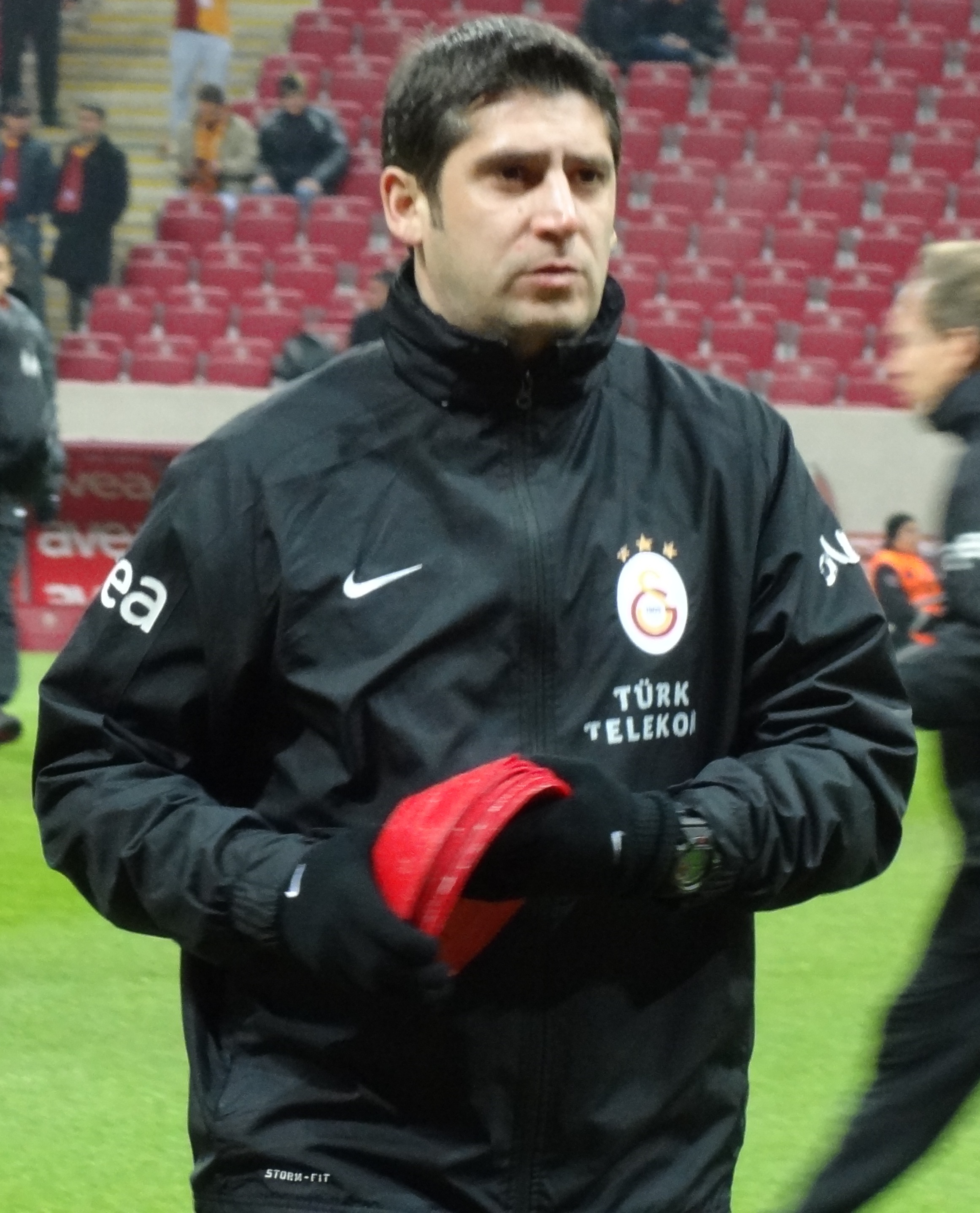 Ümit Davala Galatasaray antrenörü iken 11 Şubat Kayserispor maç öncesi.